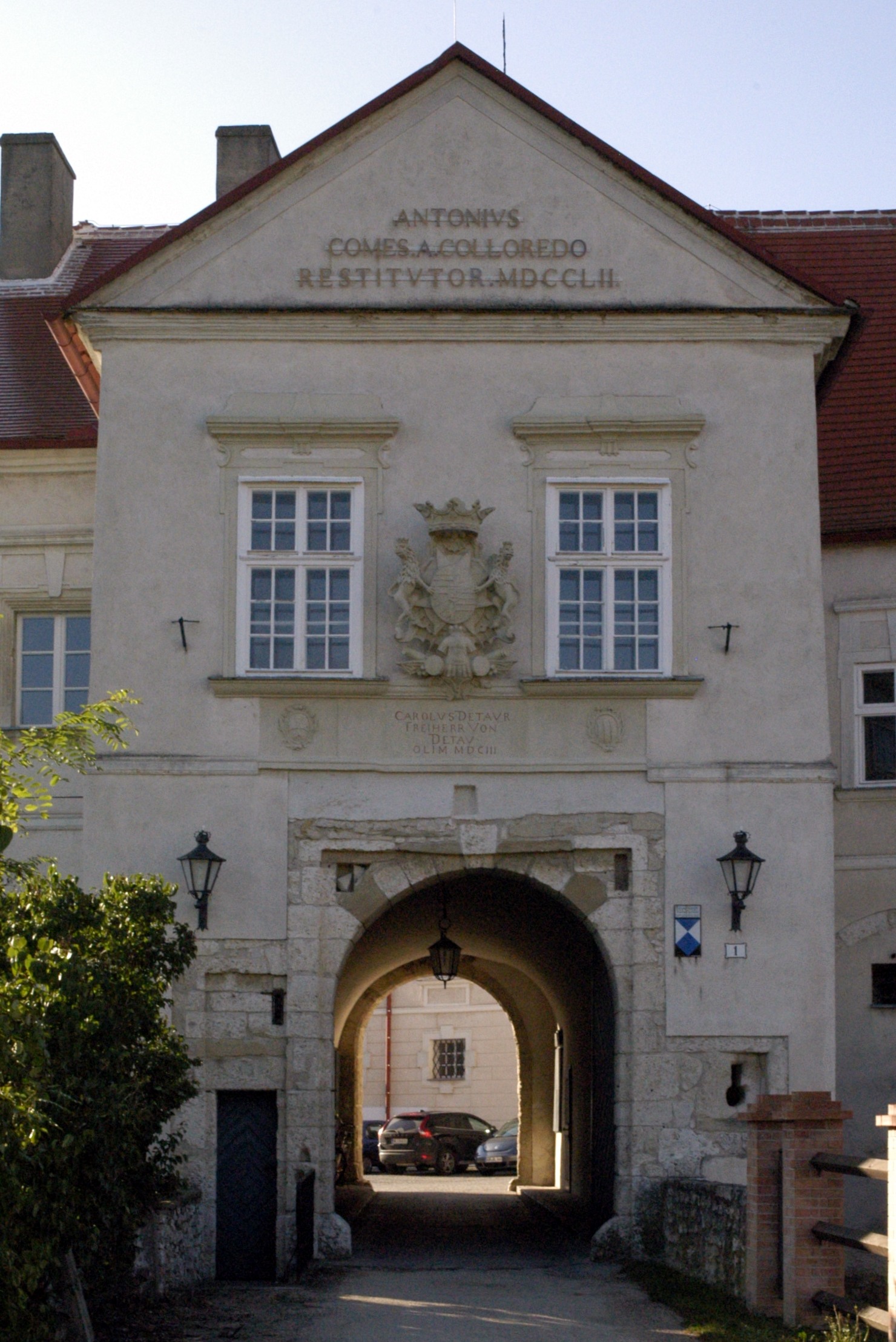 Schloss Mailberg mit Grabenanlage und Johannes-Nepomuk-Bildstock (Detail Tortrakt)